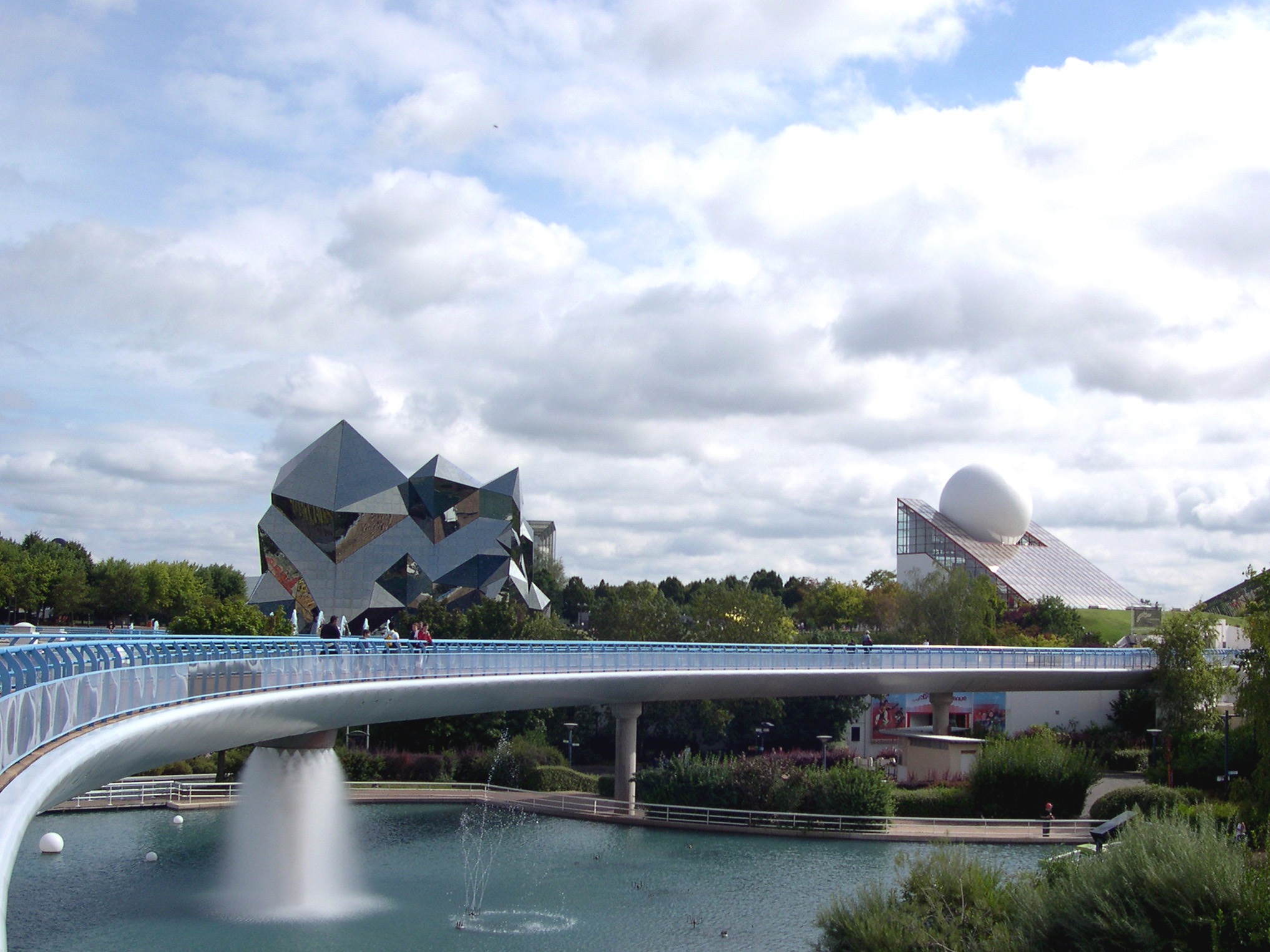 Le Kinémax et le Pavillon du Futuroscope, ainsi qu'une des passerelles du Parc. Photo prise en août 2006.